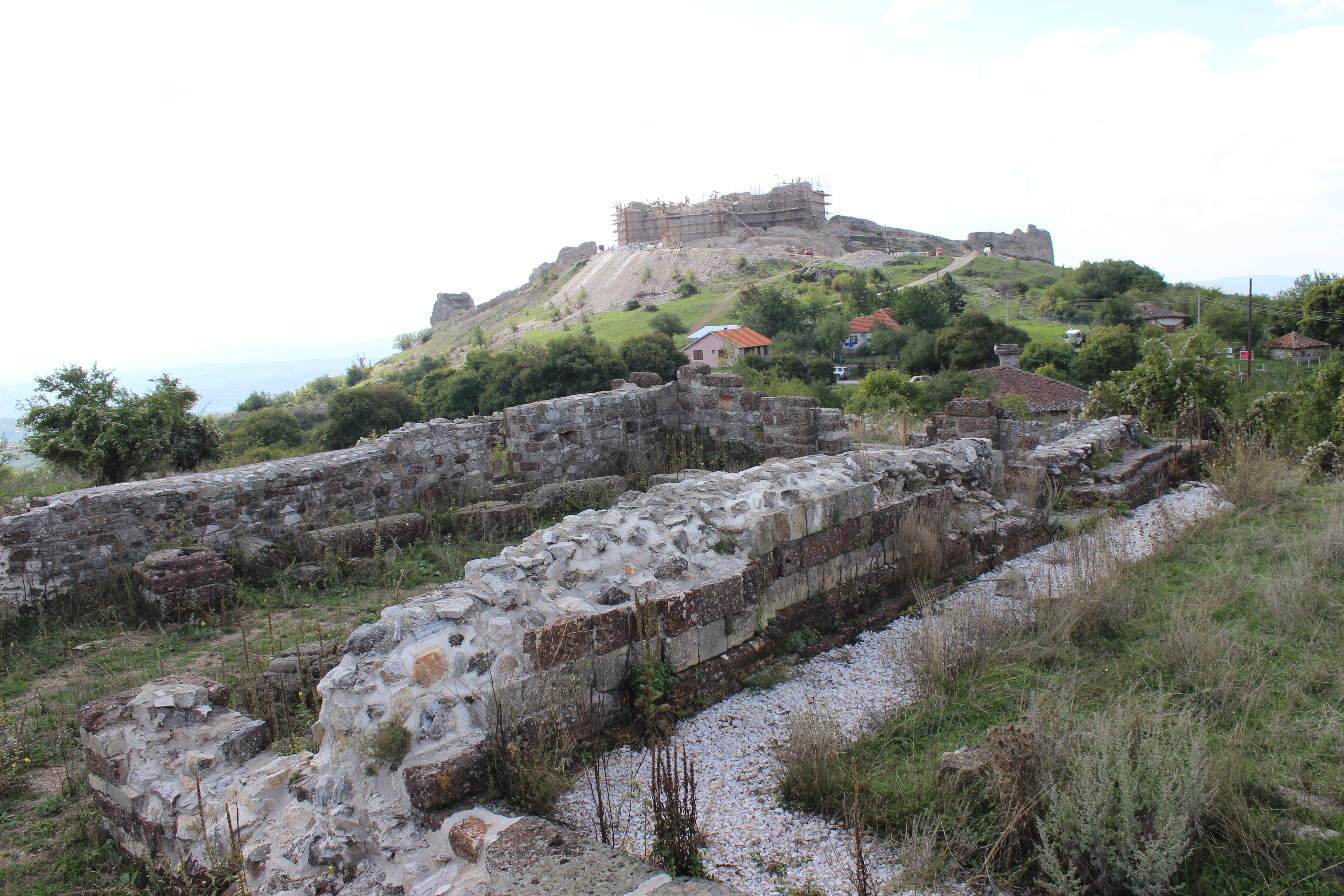 Gërmadhat e kishës Sakse nëArtanë